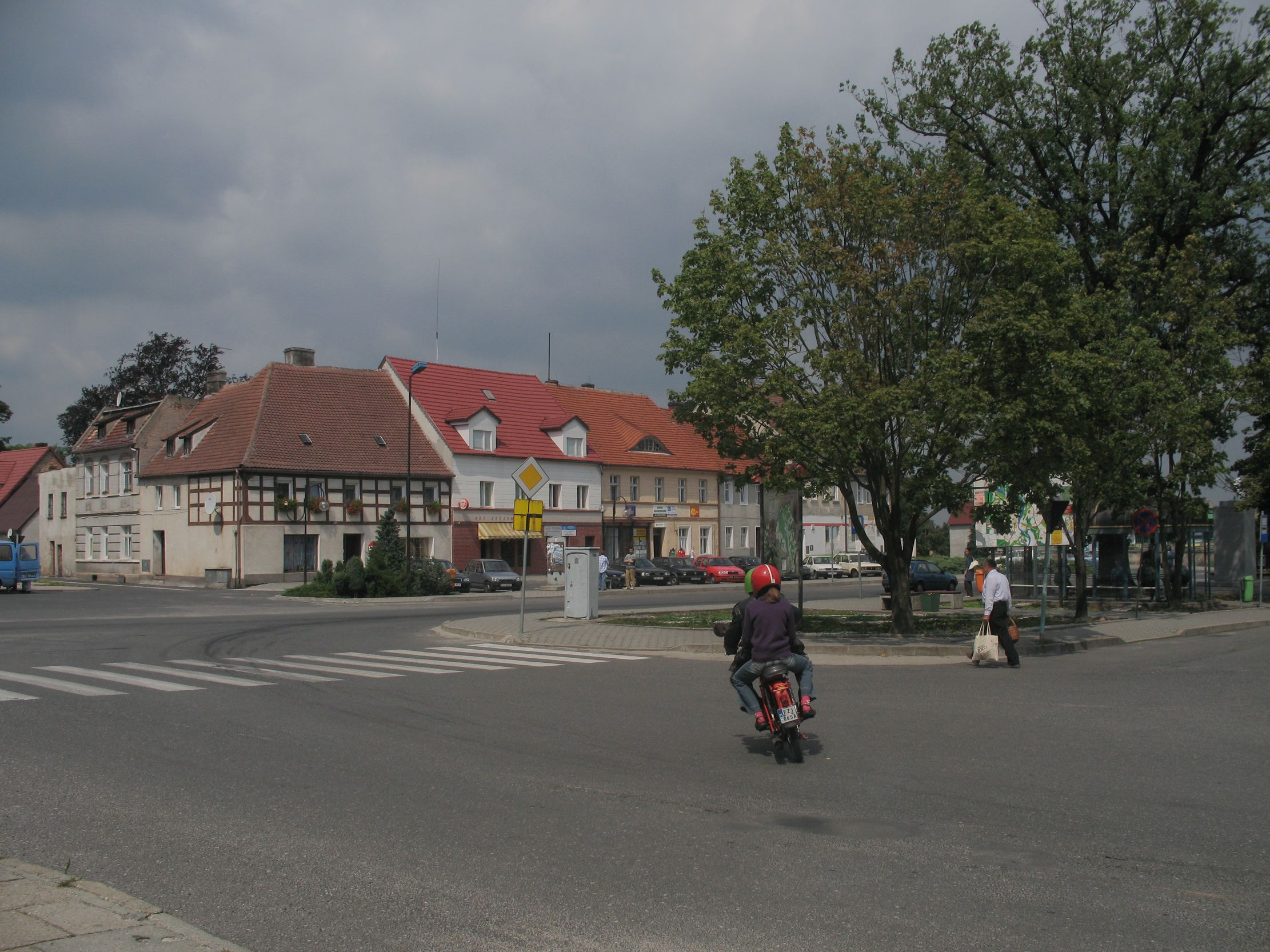 The centre of Nowogród Bobrzański, Poland